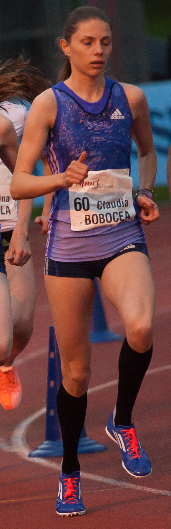 Salzburger Leichtathletik Gala am 27. Mai 2015: Claudia Bobocea